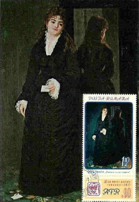 Femeia cu scrisoarea - Carte postala cu timbru